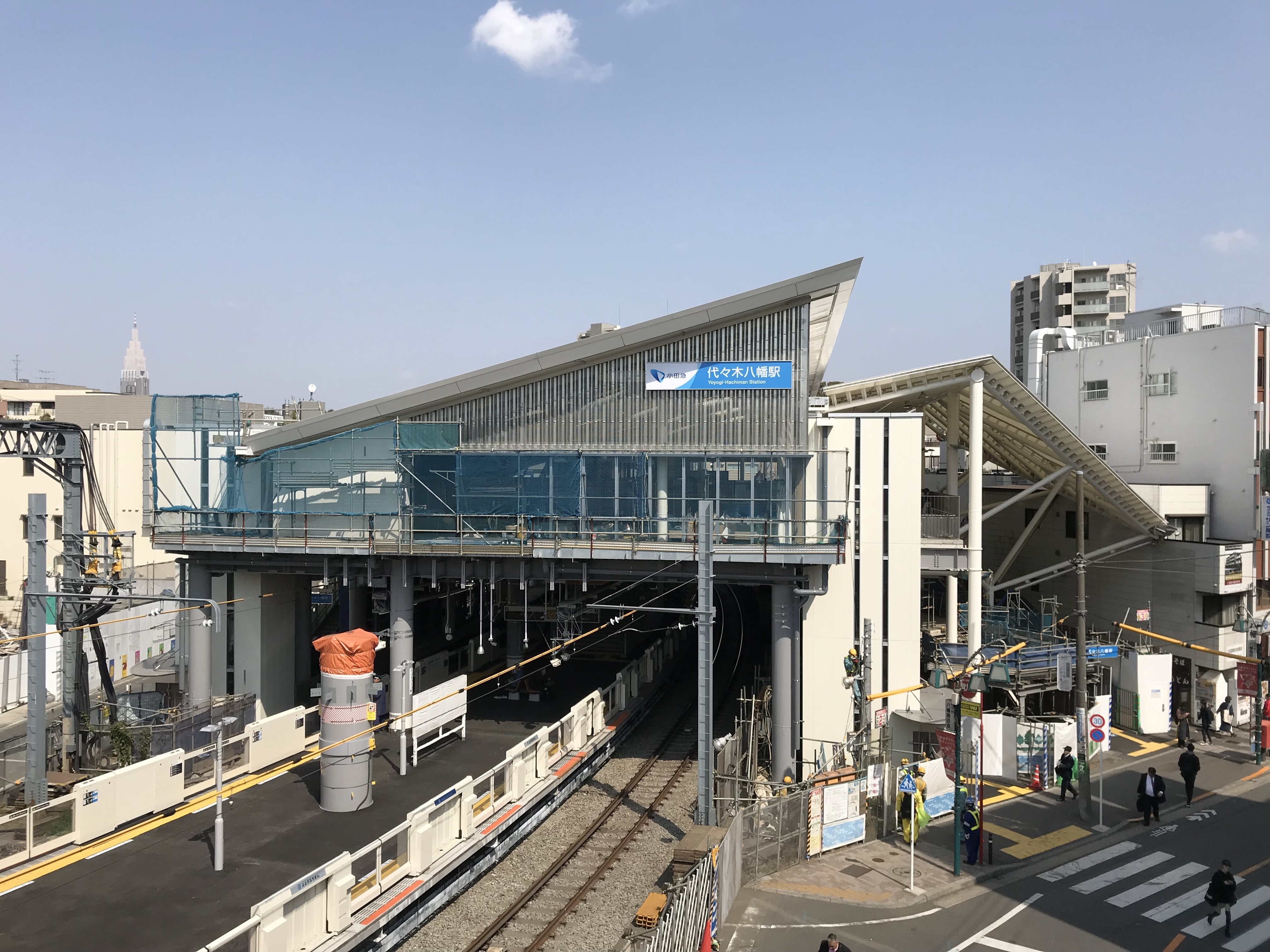 小田急小田原線代々木八幡駅駅舎（2019年3月現在）